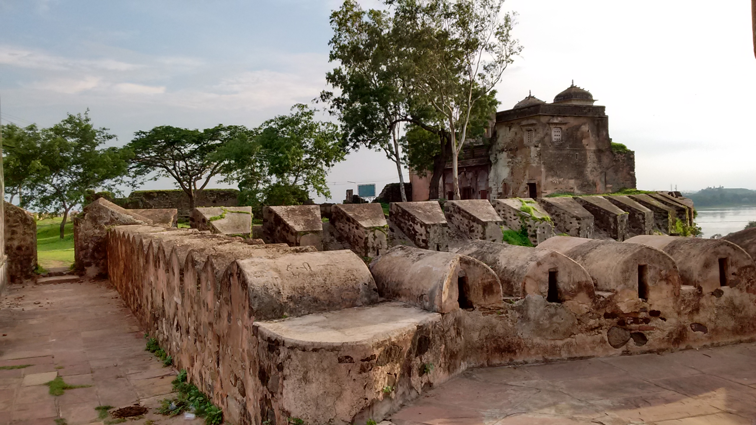 Kharbuza Mahal, Dhar, Madhya Pradesh